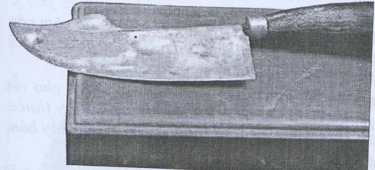 Hình do người truyền lên chụp từ Tạp chí nghiên cứu và phát triển số 3.(51).2005. Ảnh miêu tả: Yêm đao.